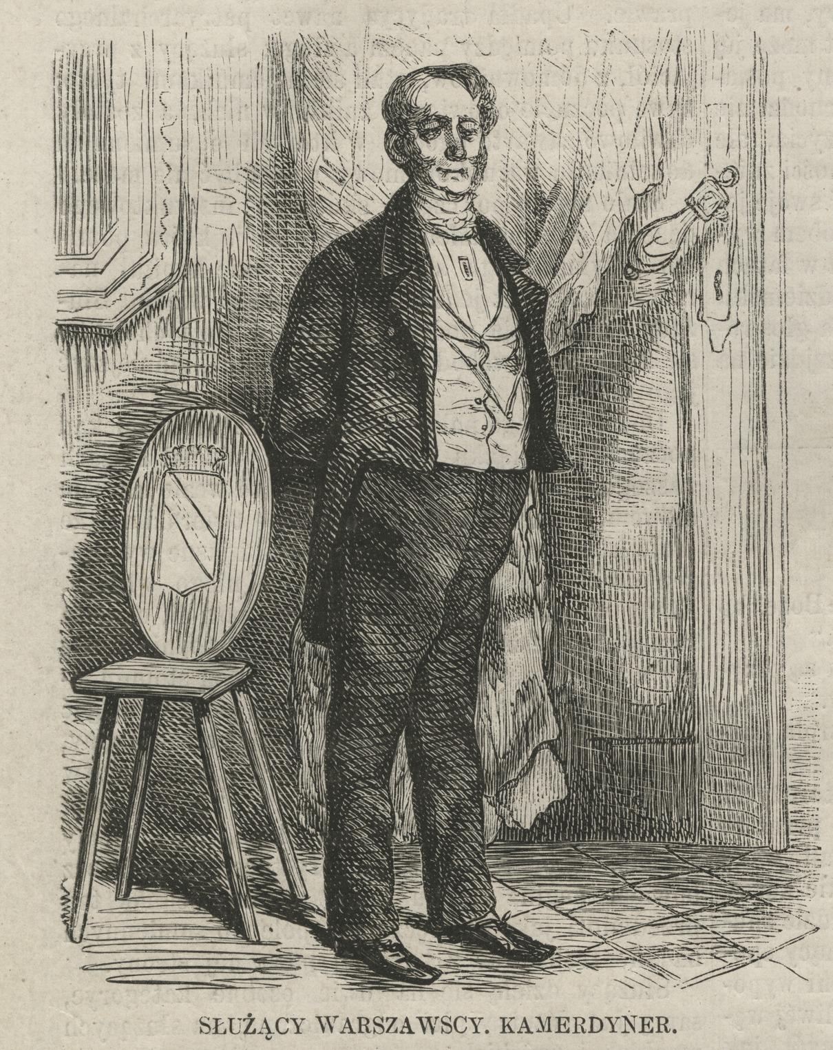 Kamerdyner